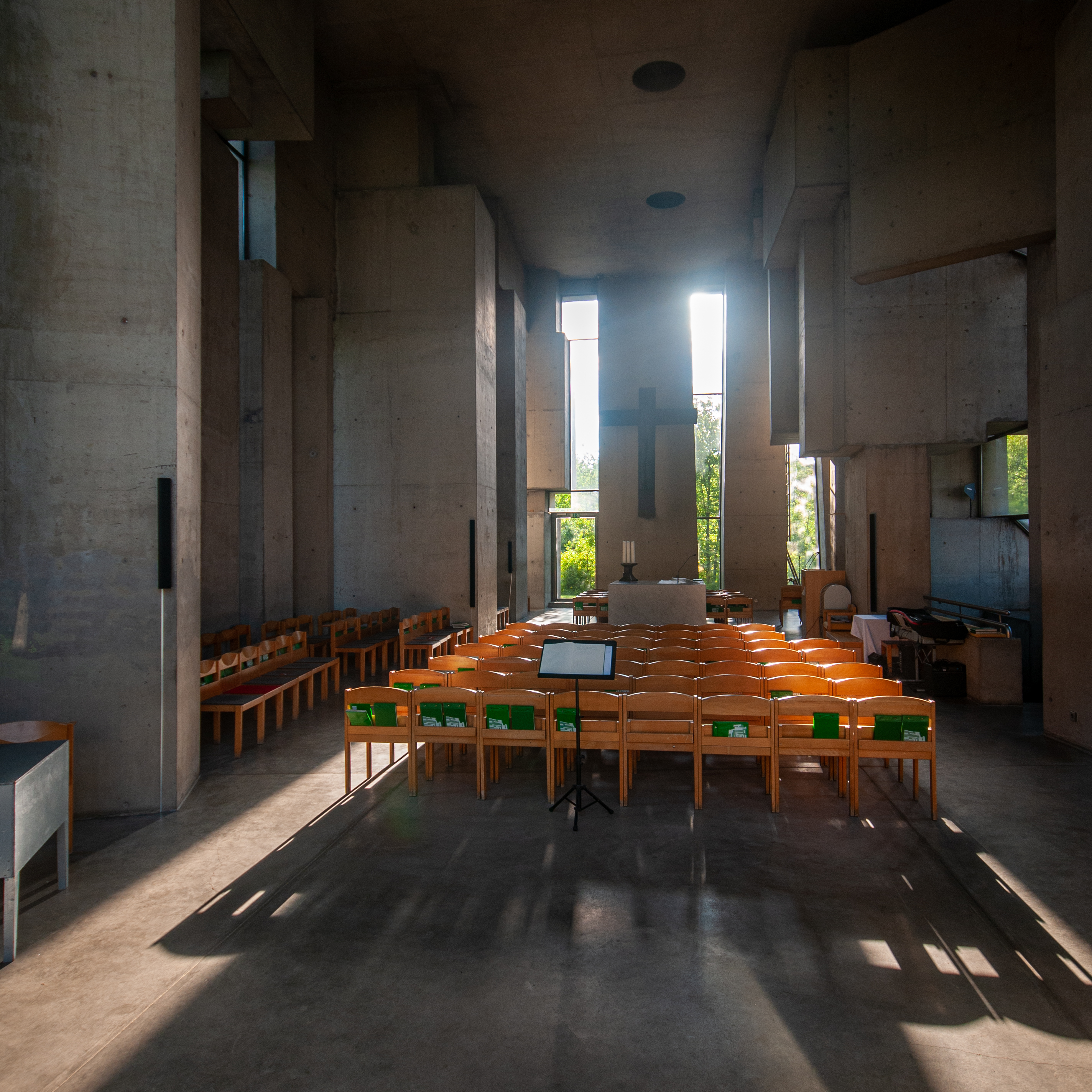 Innenansicht der Wotrubakirche mit Blick auf den Altar